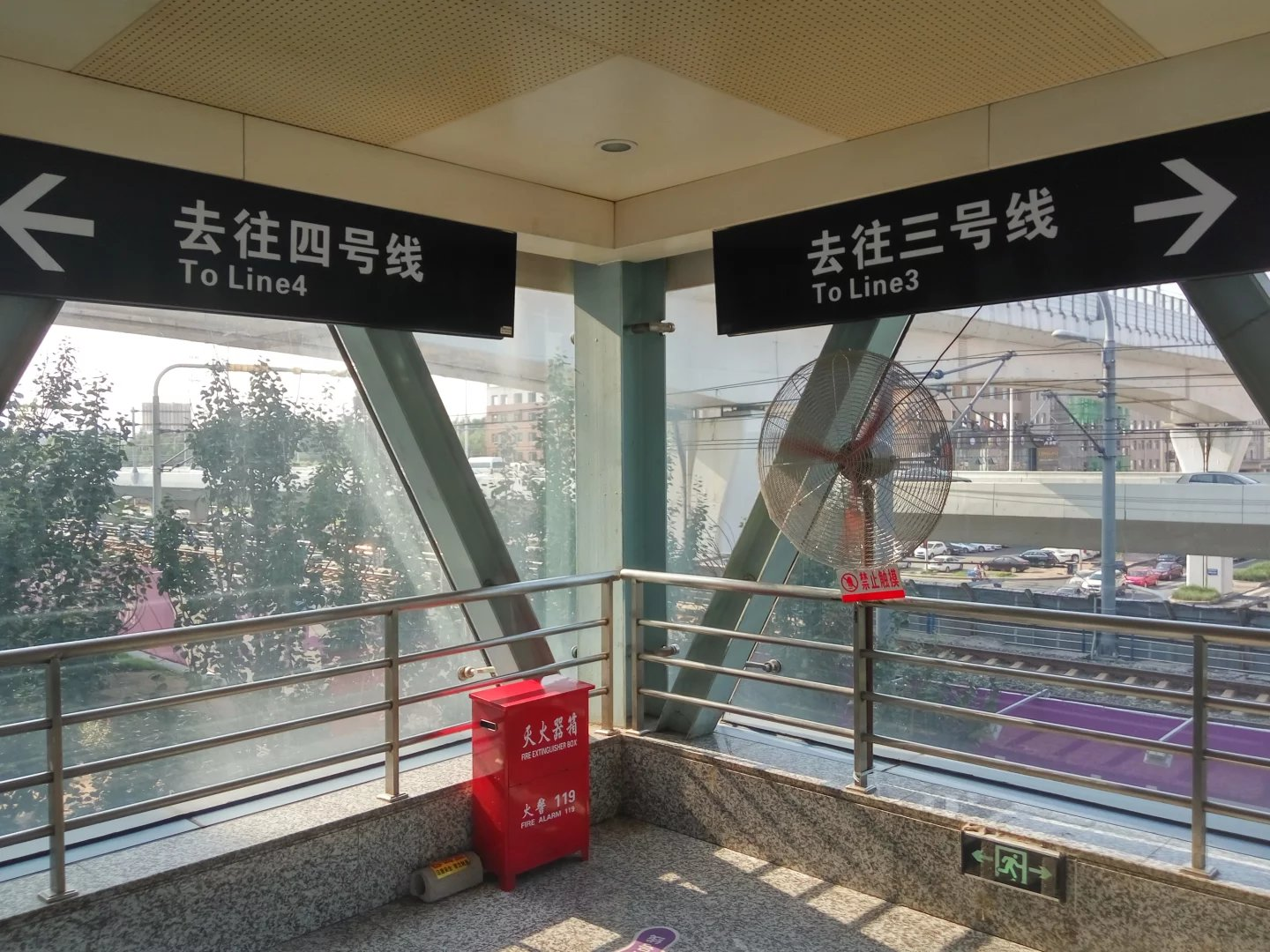 职业学院站换乘通道